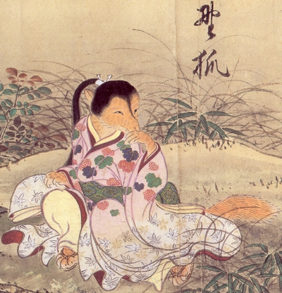 Yako (野狐) from the Hyakkai Zukan (百怪図巻)